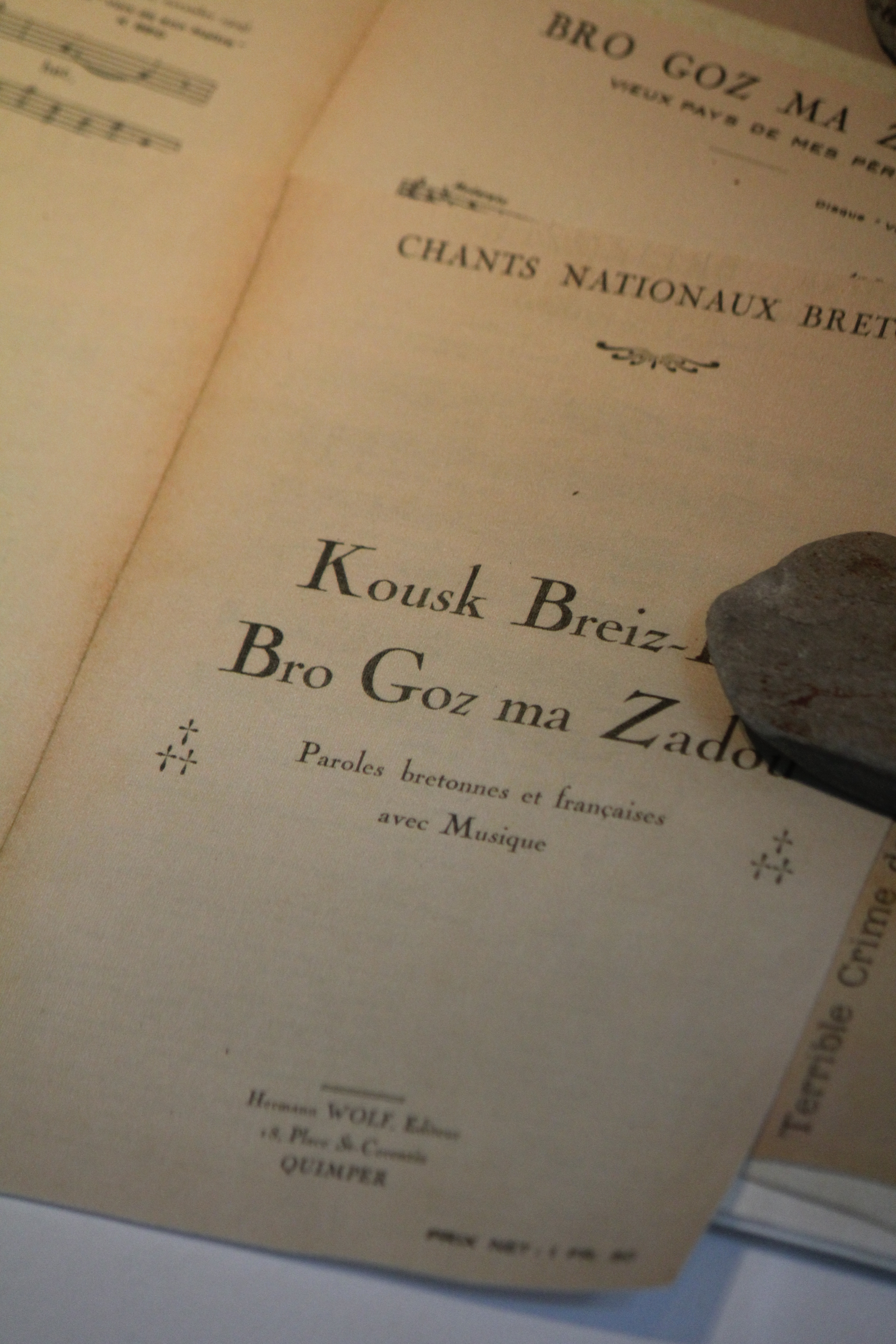 feuille d'un livret présentant le Bro Gozh, début du XXe